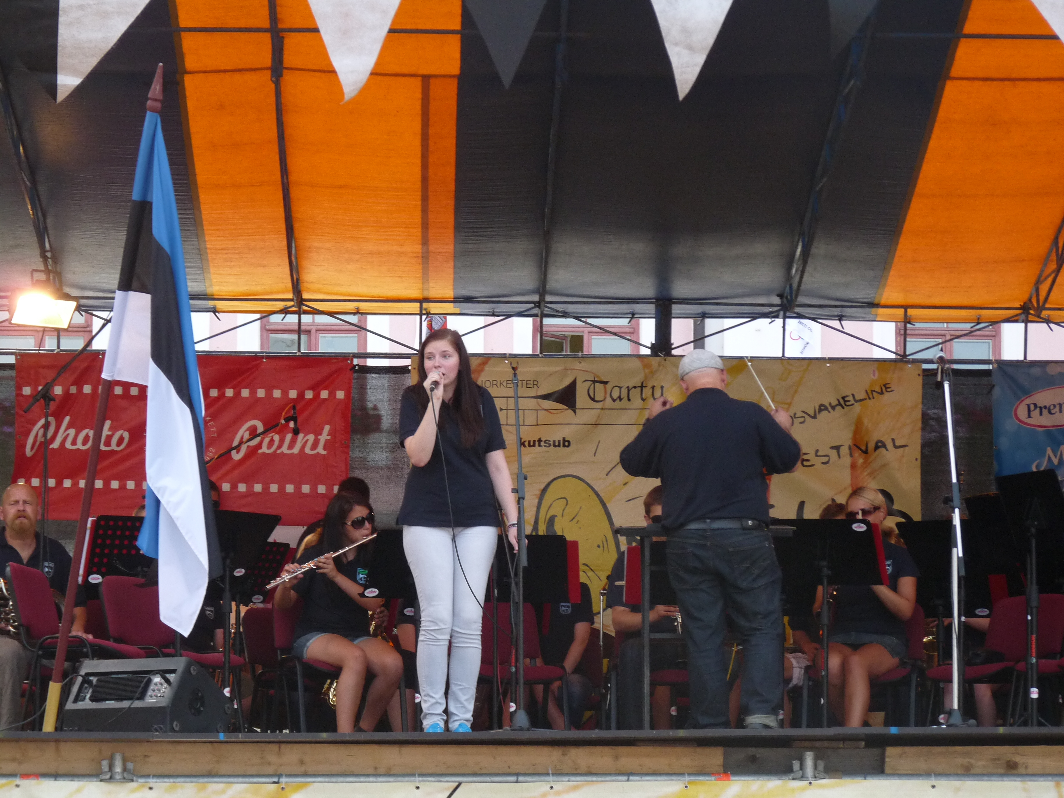 Põlva Linna Puhkpilliorkester esinemas Tartu rahvusvahelisel puhkpillifestivalil "Mürtsub Pill", laulab Kristin Kaha, 3. august 2012. Foto: Oop.